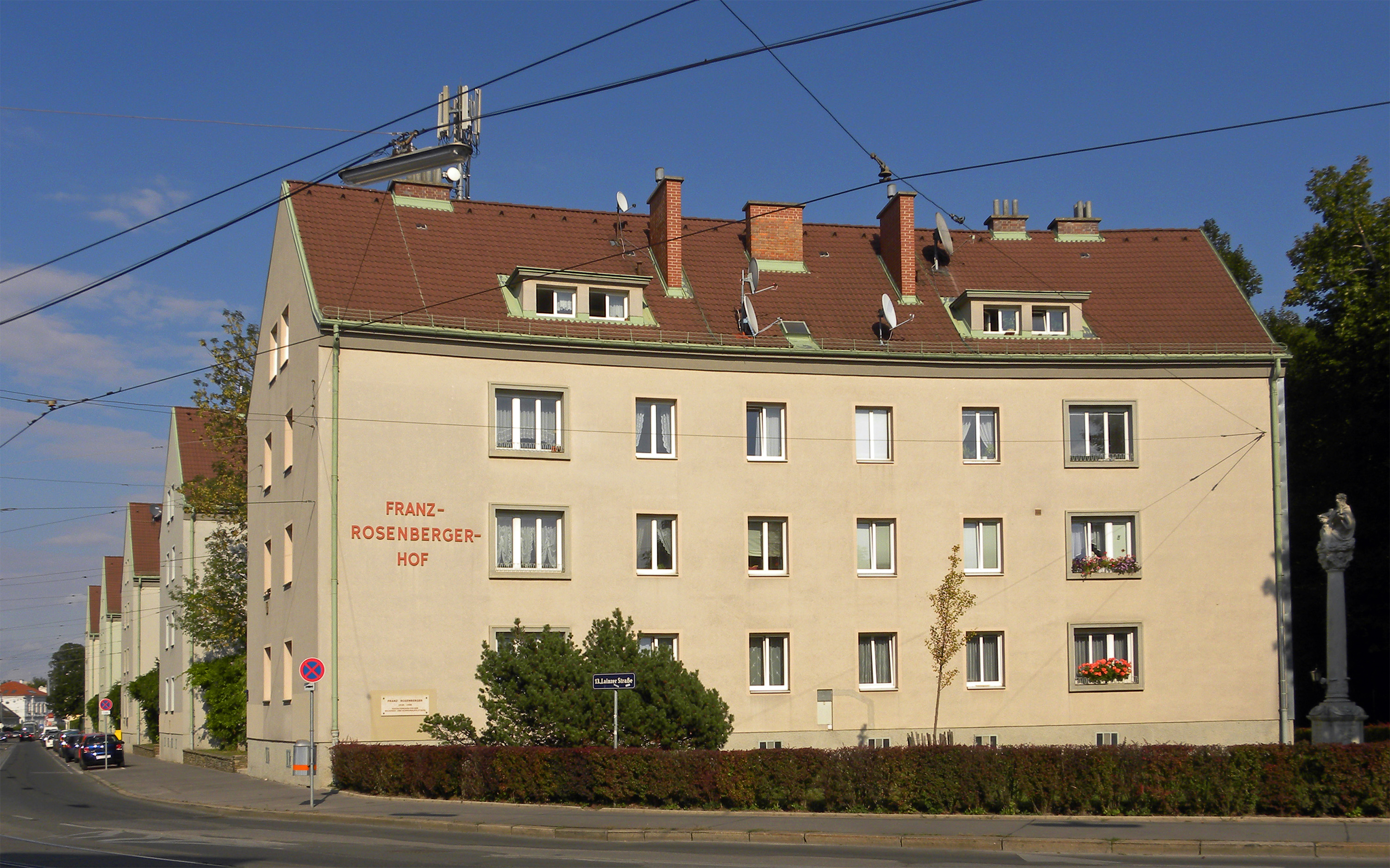 Kommunaler Wohnbau - Franz Rosenberger-Hof